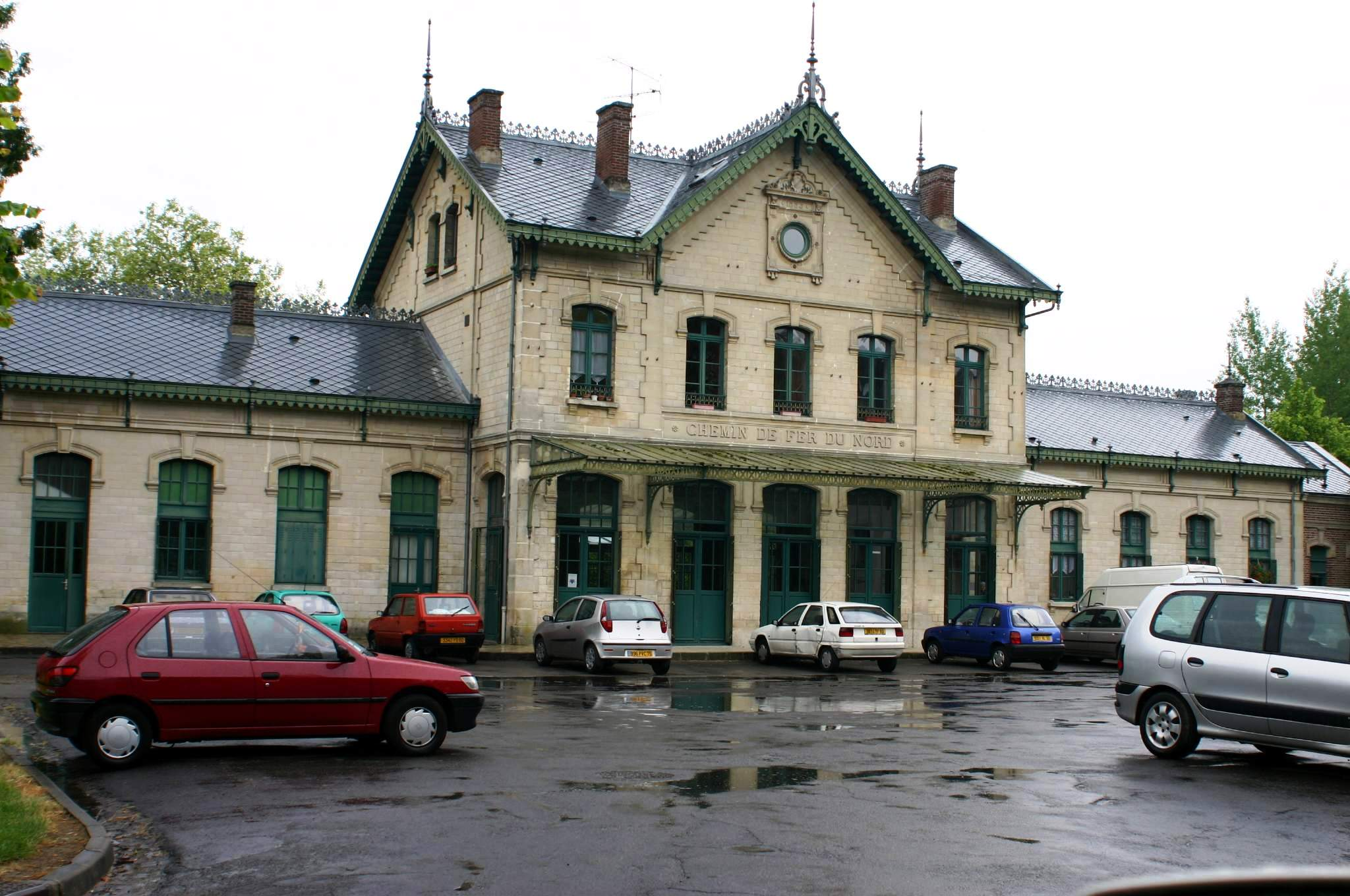 Gare vu Pierrefonds.